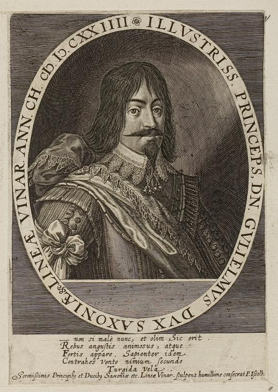 Grafik aus dem Klebeband Nr. 1 der Fürstlich Waldeckschen Hofbibliothek Arolsen Motiv: Herzog Wilhelm von Sachsen-Weimar